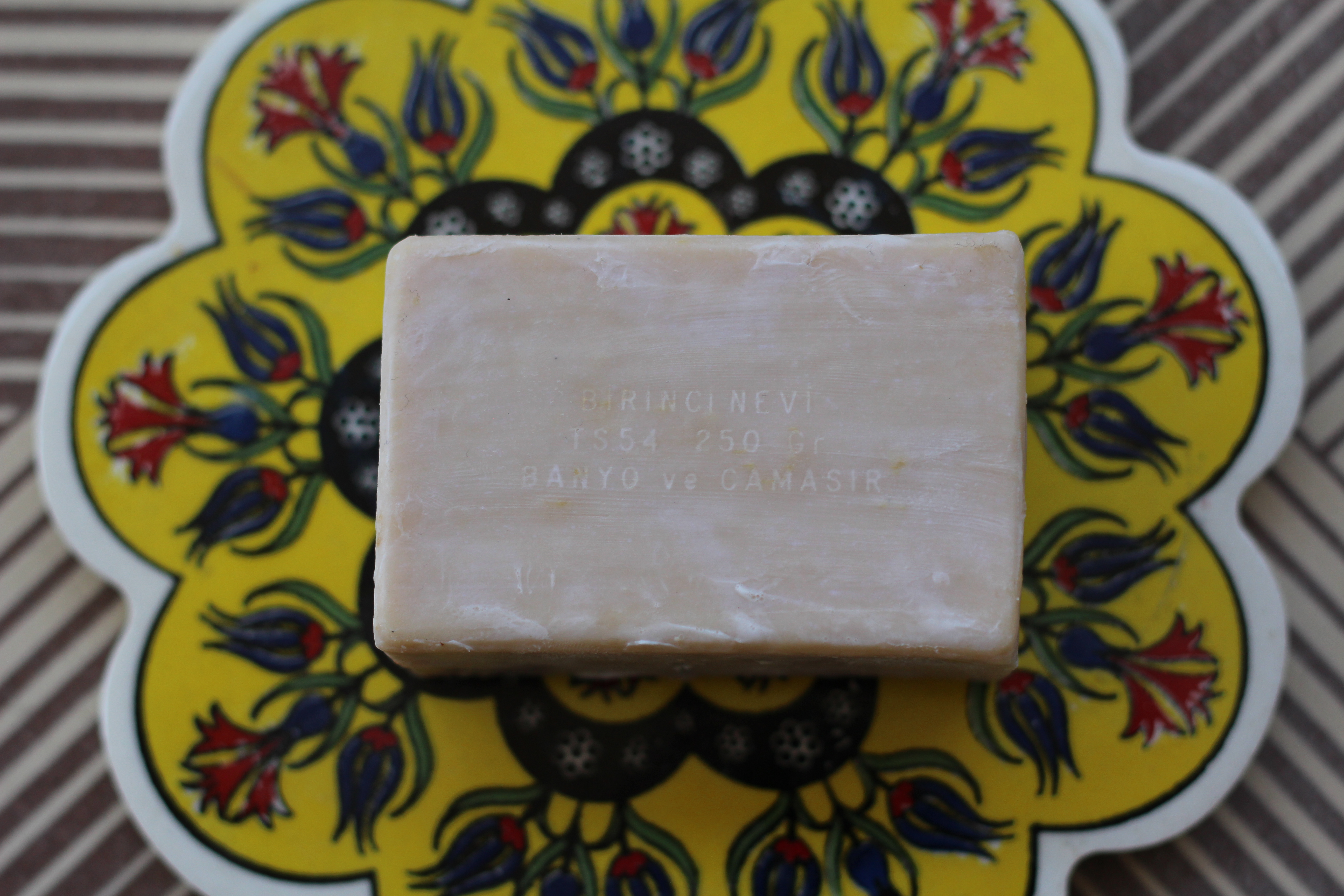 Հաջը Շաքիր օճառ, Soap Hacı Şakir